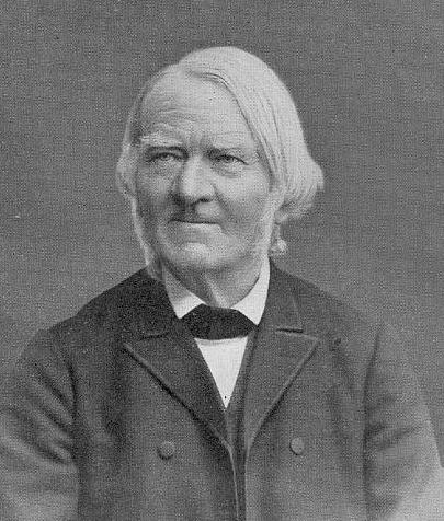 Alfred Fleckeisen (1820–1899), deutscher Altphilologe. Originalphotographie von W. Höfert, Dresden (im Besitz von Frau M. Voss, München)